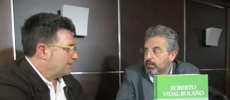 Francisco Macías, director de Edicións Positivas (dereita), e Xosé Manuel Fernández Castro 'Pepes', escritor e investigador (esquerda), na presentación de Obras Completas de Roberto Vidal Bolaño.